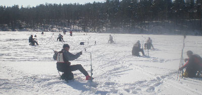 Pilkkihiihtokilpailut Ruokolahdessa pitkäperjantaina 2008.